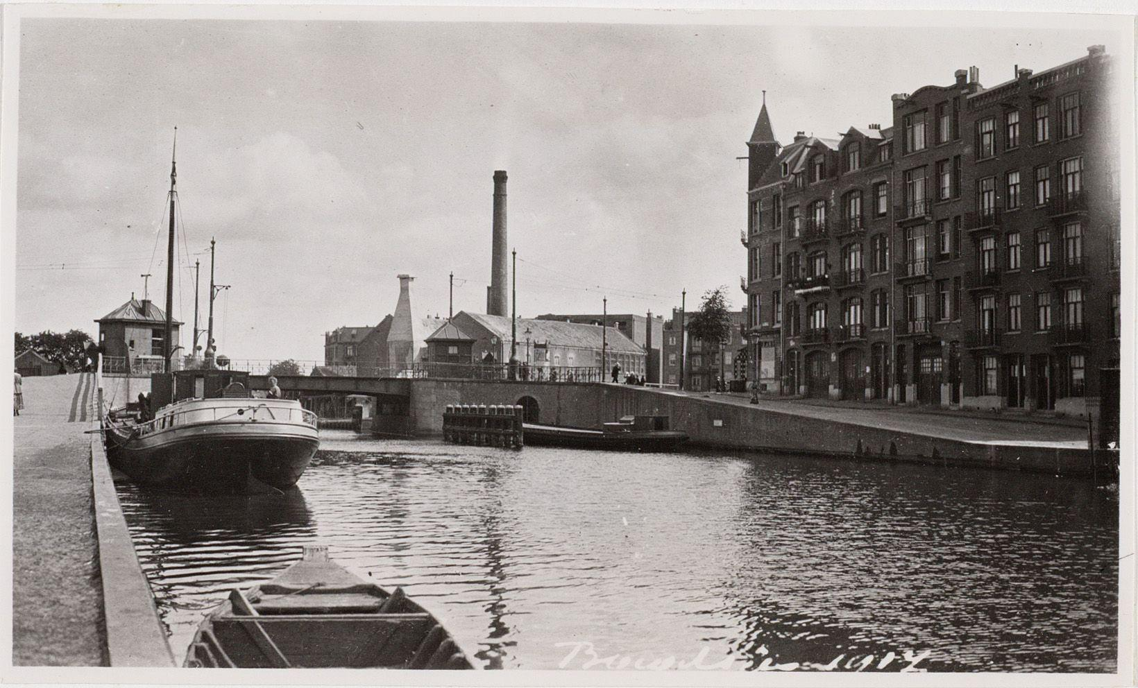 Beschrijving Kostverlorenvaart Gezien naar brug 173 (Wiegbrug) voor Admiraal de Ruijterweg. Links: Baarsjesweg en rechts: Tweede Kostverlorenkade en ingang De Clercqstraat. In het midden achter: de Hollandsche Stoomgipsfabriek Serie: Buurt en Stad Zimmerhoeve Documenttype foto Vervaardiger Eck, J. van (Jacobus, 1873-1946) Collectie Collectie J. van Eck: foto's Datering 1917 Geografische naam Admiraal De Ruijterweg Baarsjesweg Tweede Kostverlorenkade De Clercqstraat Kostverlorenvaart Inventarissen Afbeeldingsbestand A01634001256 Generated with Dememorixer